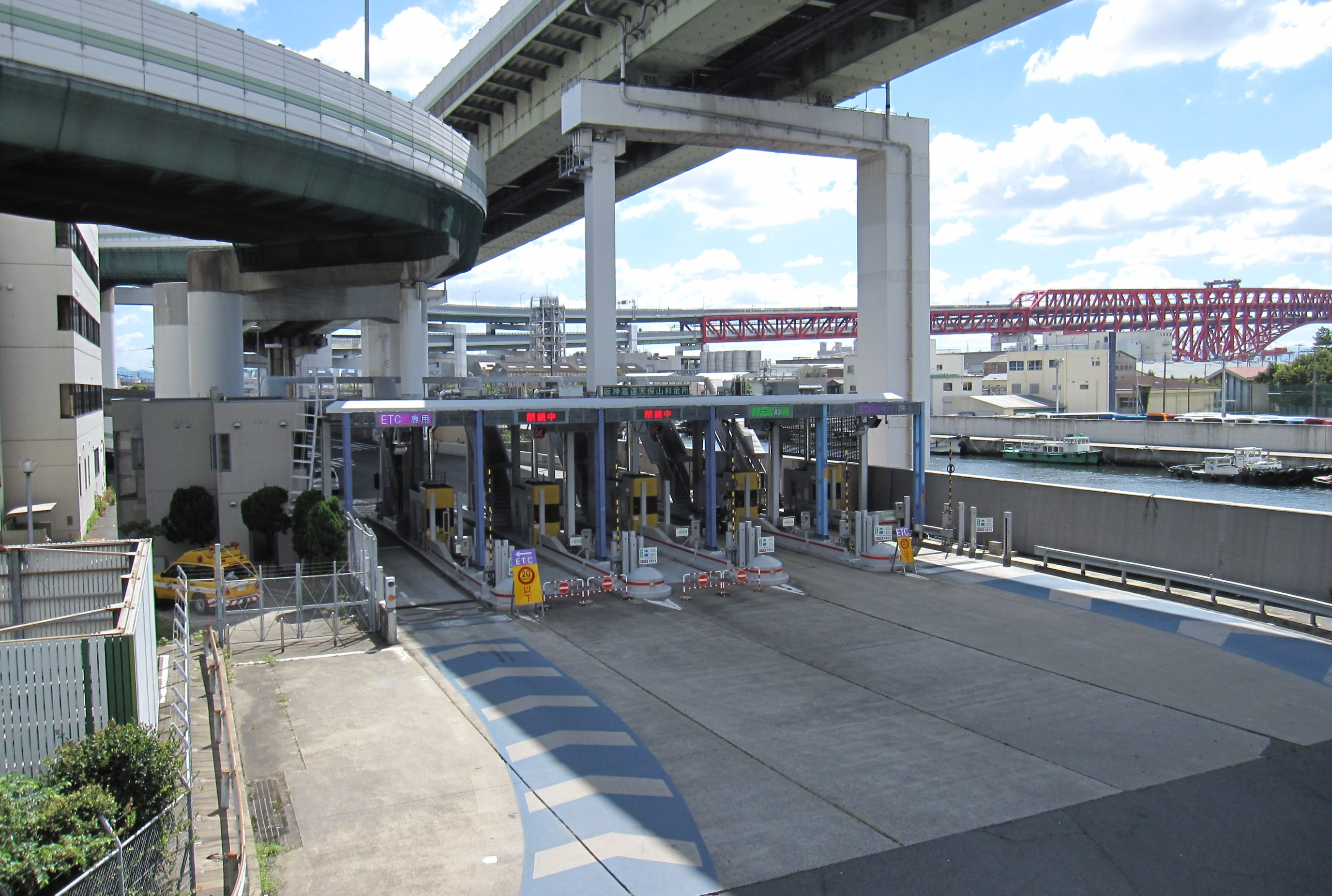 阪神高速天保山出入口料金所